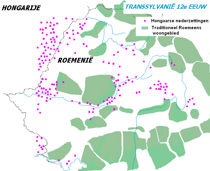 Transsylvanië in de 12e eeuw. Roze stippen zijn Hongaarse nederzettingen, groen is traditioneel woongebied van de Roemenen Publiek domein door auteurs Al en Dionysos1.